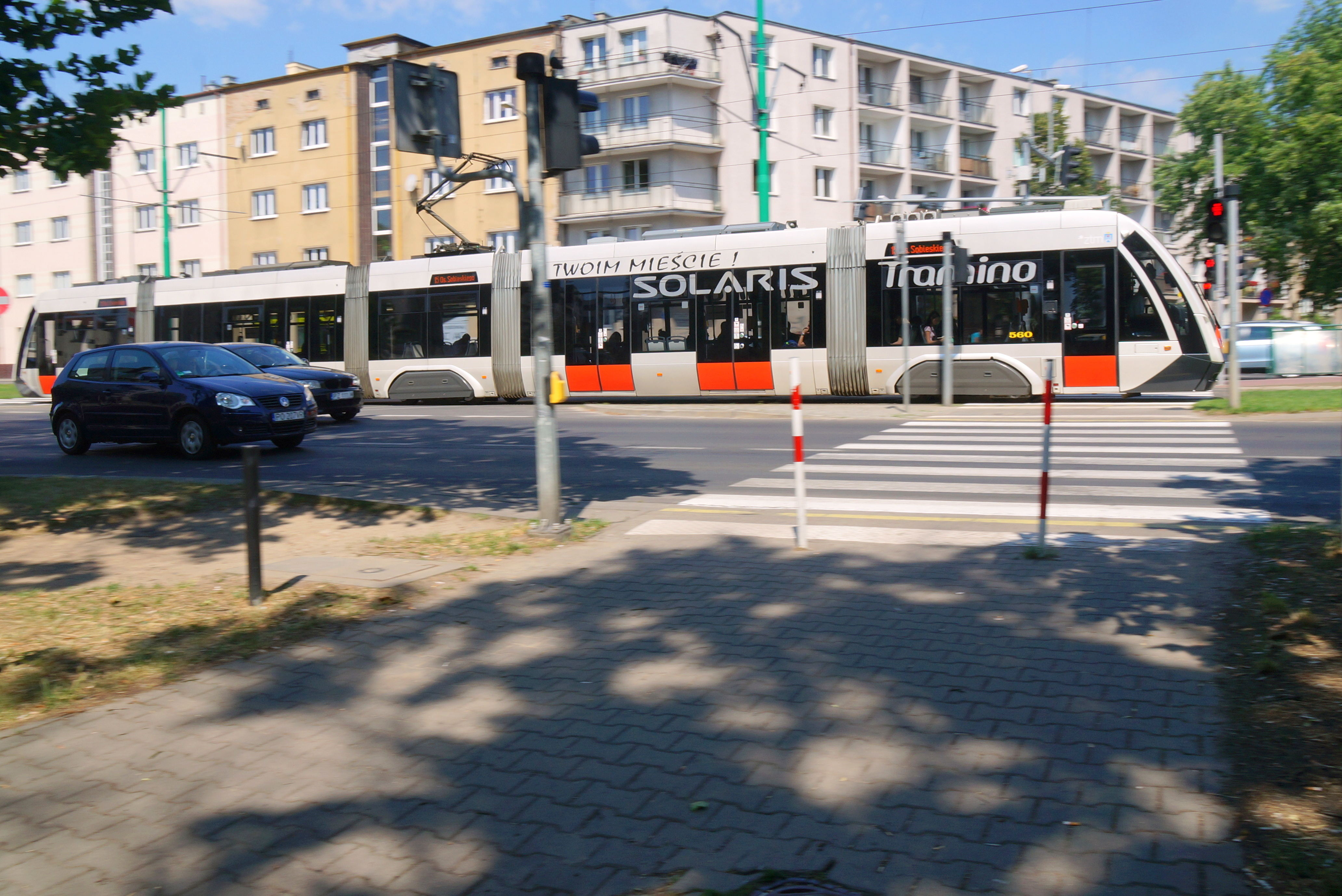 Solaris Tramino S100 (#560) na ul. Grunwaldzkiej w Poznaniu. Producentem jest firma Solaris Bus & Coach z Bolechowa koło Poznania.